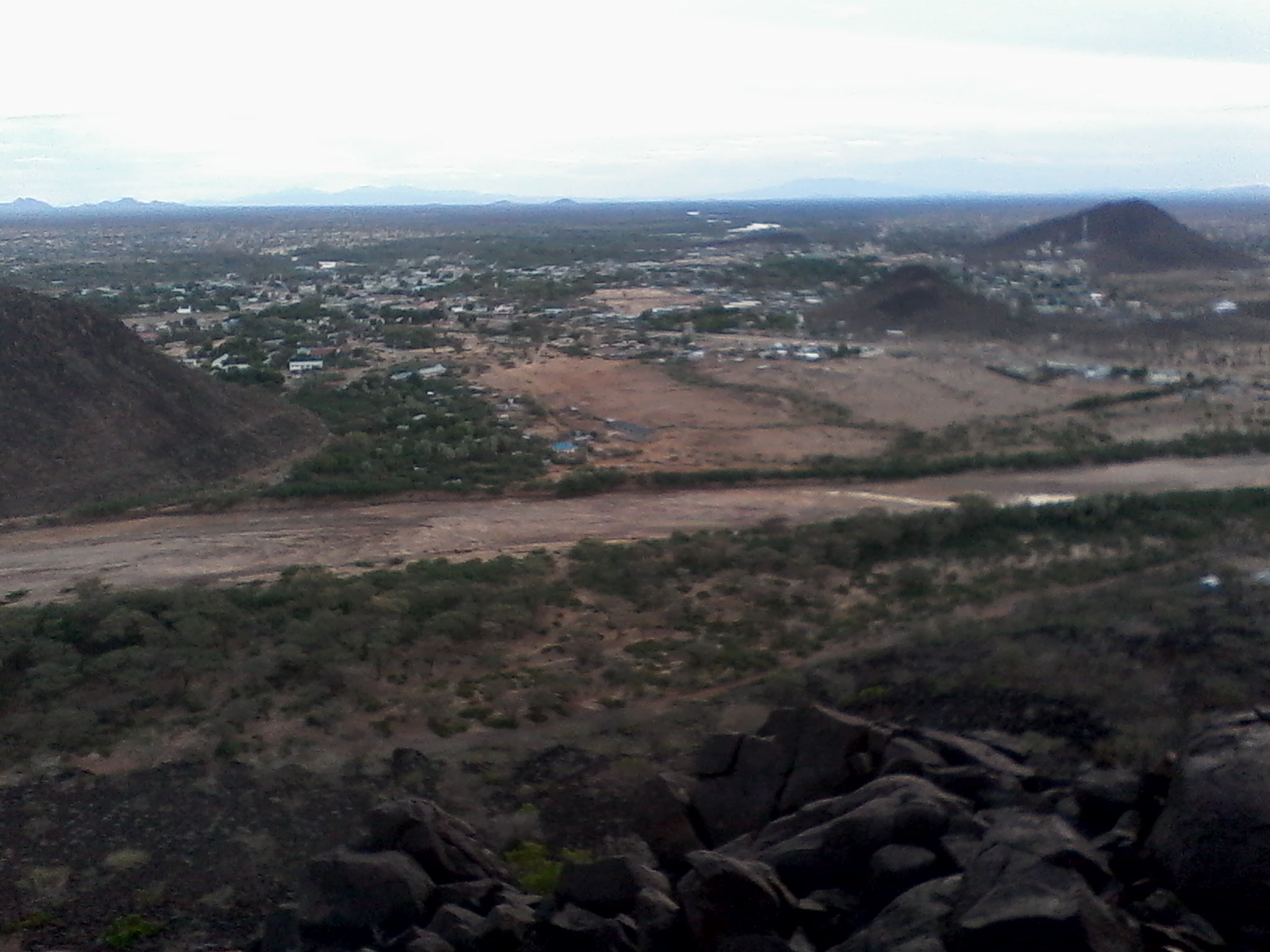 Kiswahili: Mto, Lodwar